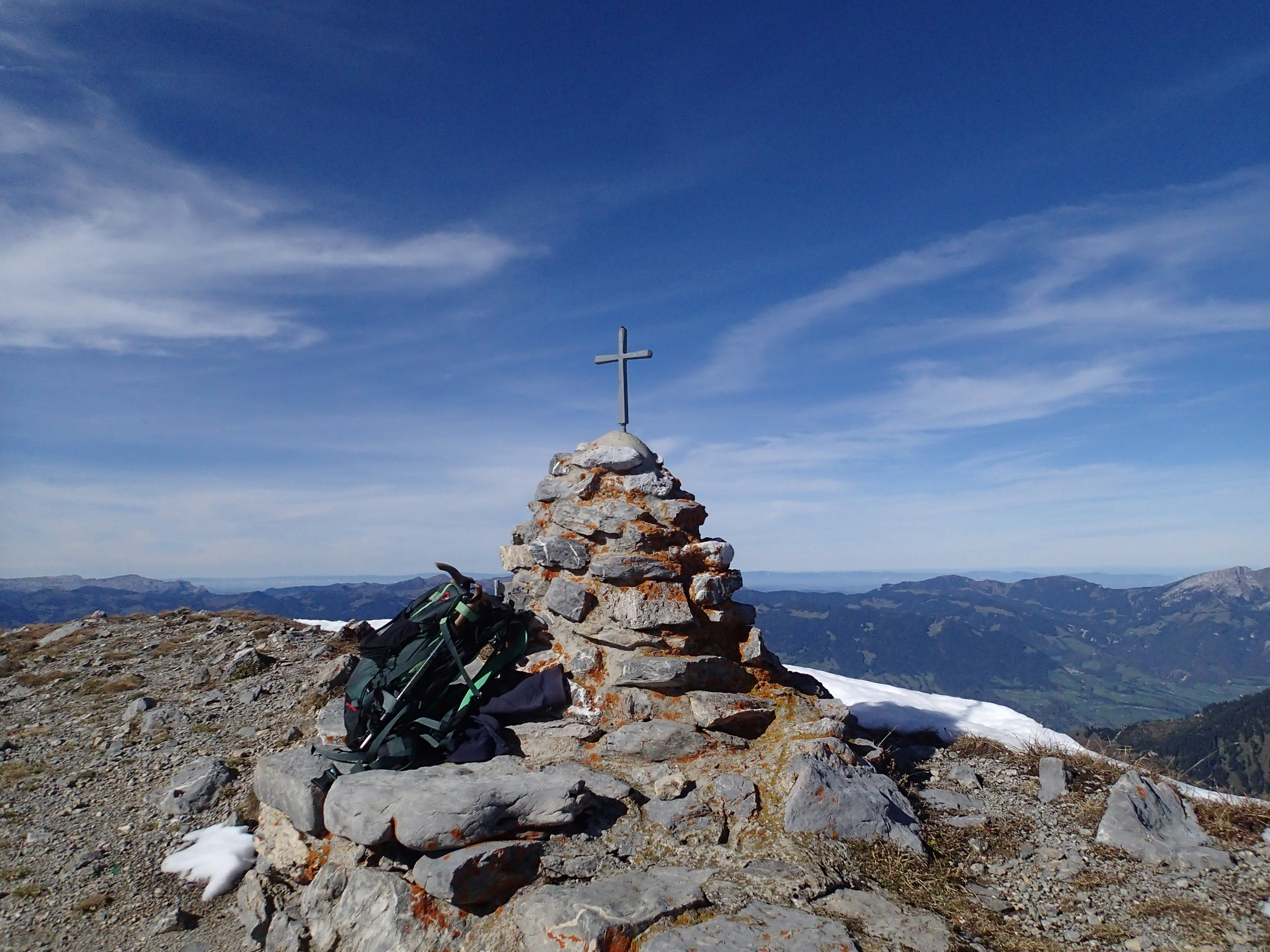 Gipfelkreuz des Widderfeldstock 2351 m im Kanton Obwalden (Schweiz).